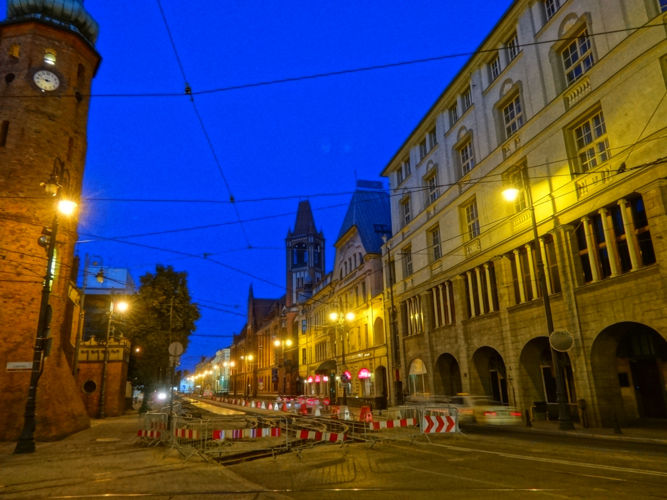 Ulica Jagiellońska w Bydgoszczy